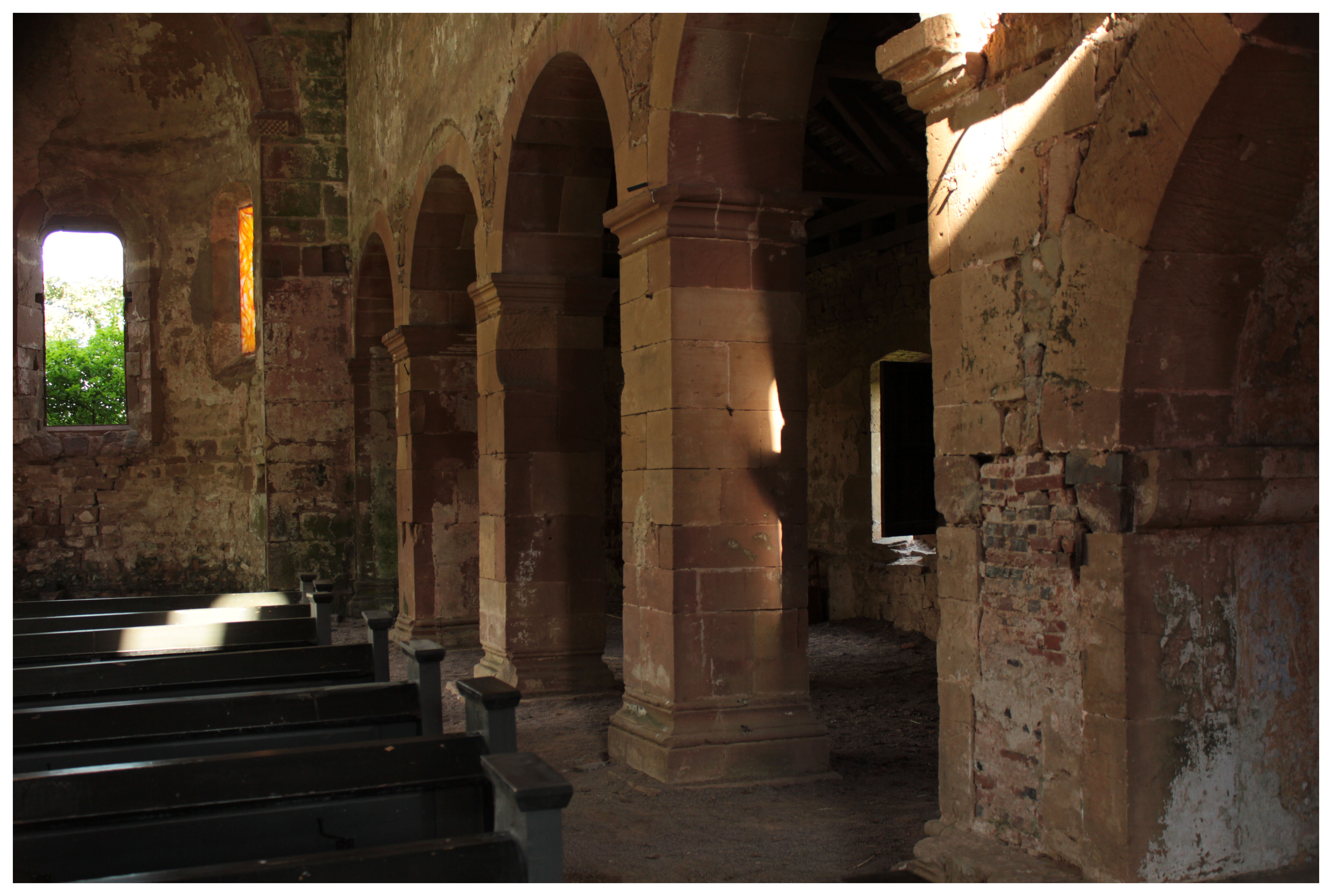 Kloster Konradsdorf, Innenansicht Foto: Diana Heßner